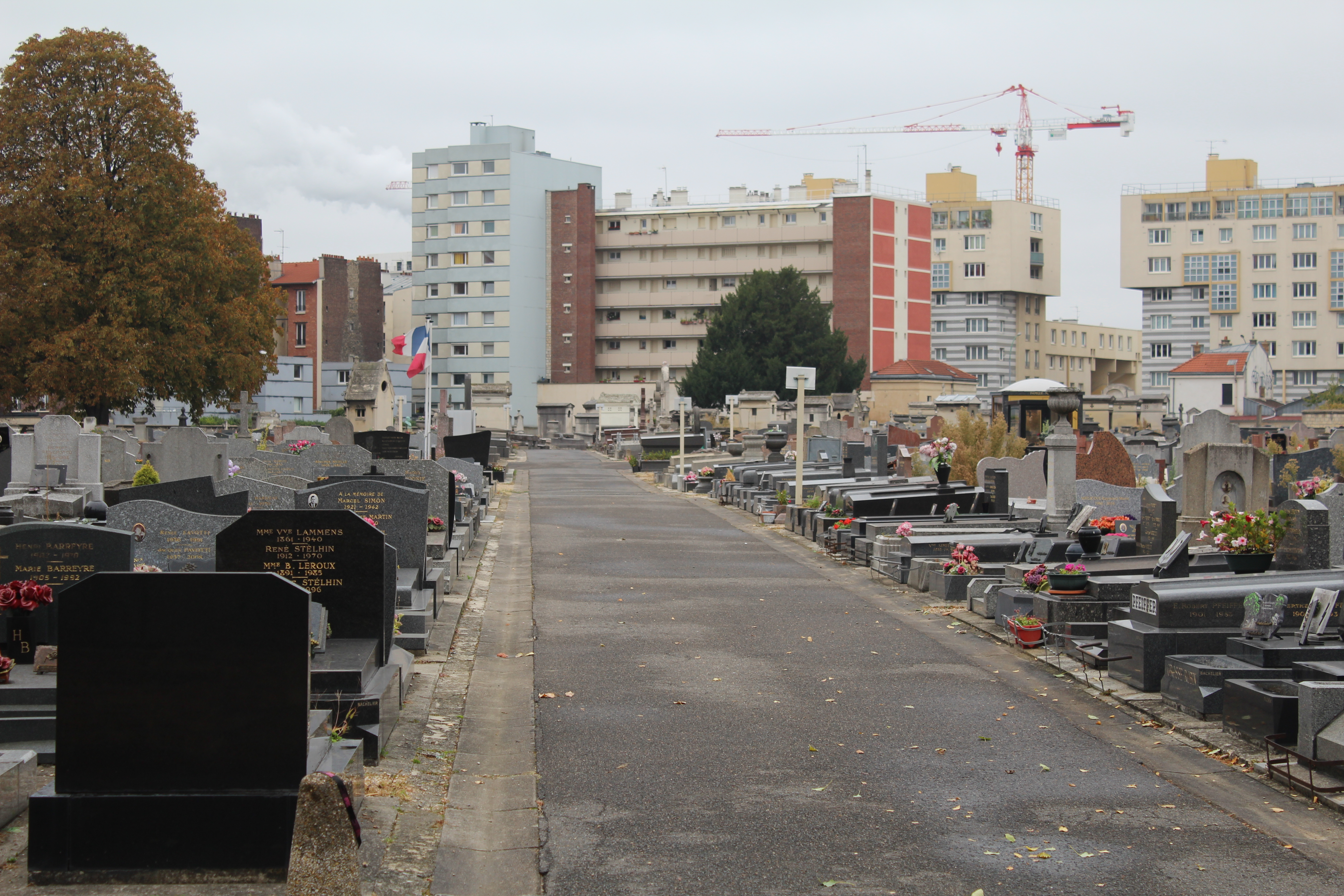 Cimetière de Saint-Ouen, Seine-Saint-Denis.